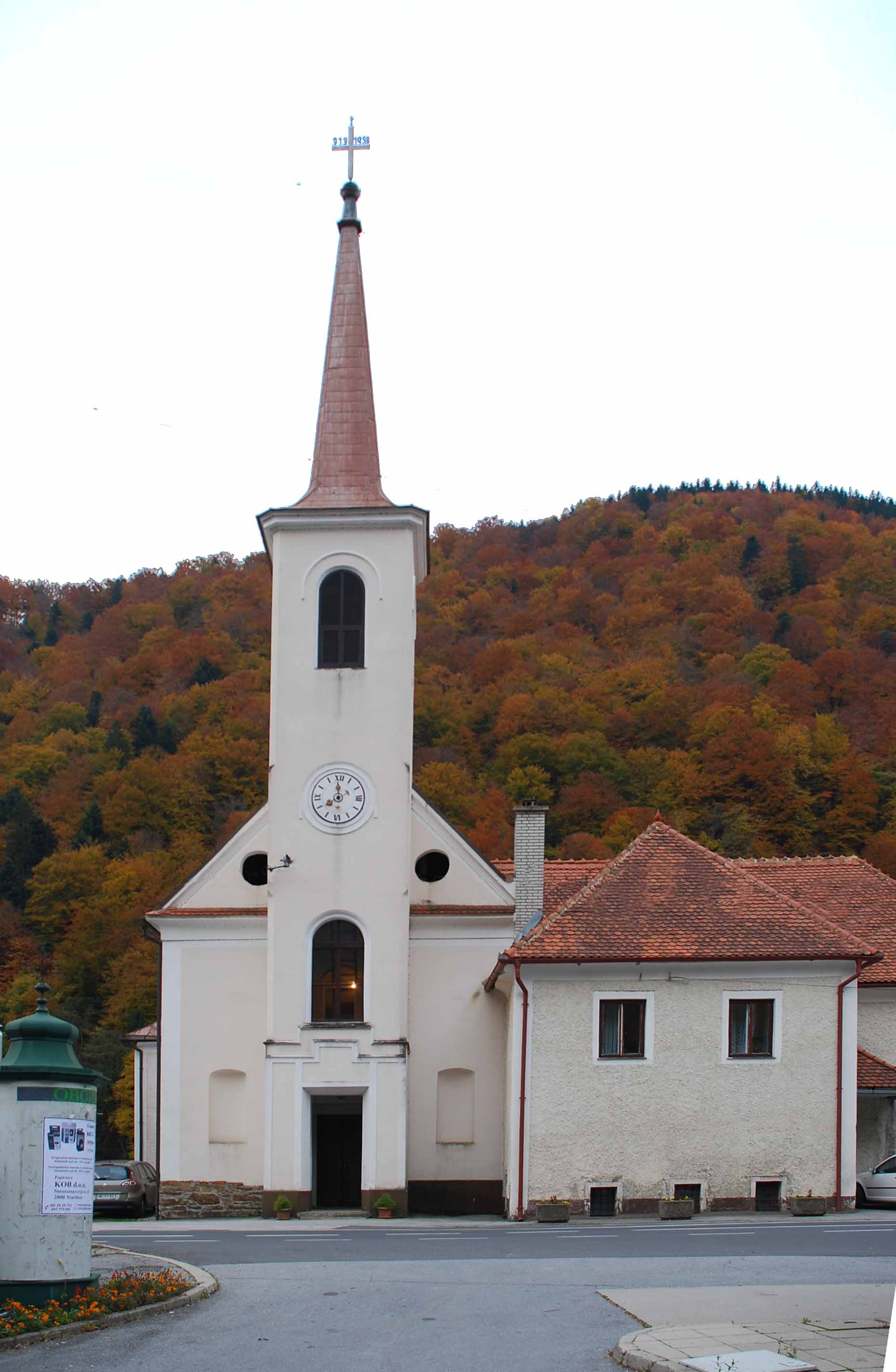 Pfarrkirche von Ožbalt (St. Oswald im Drauwald, St. Oswald an der Drau), Slowenien.